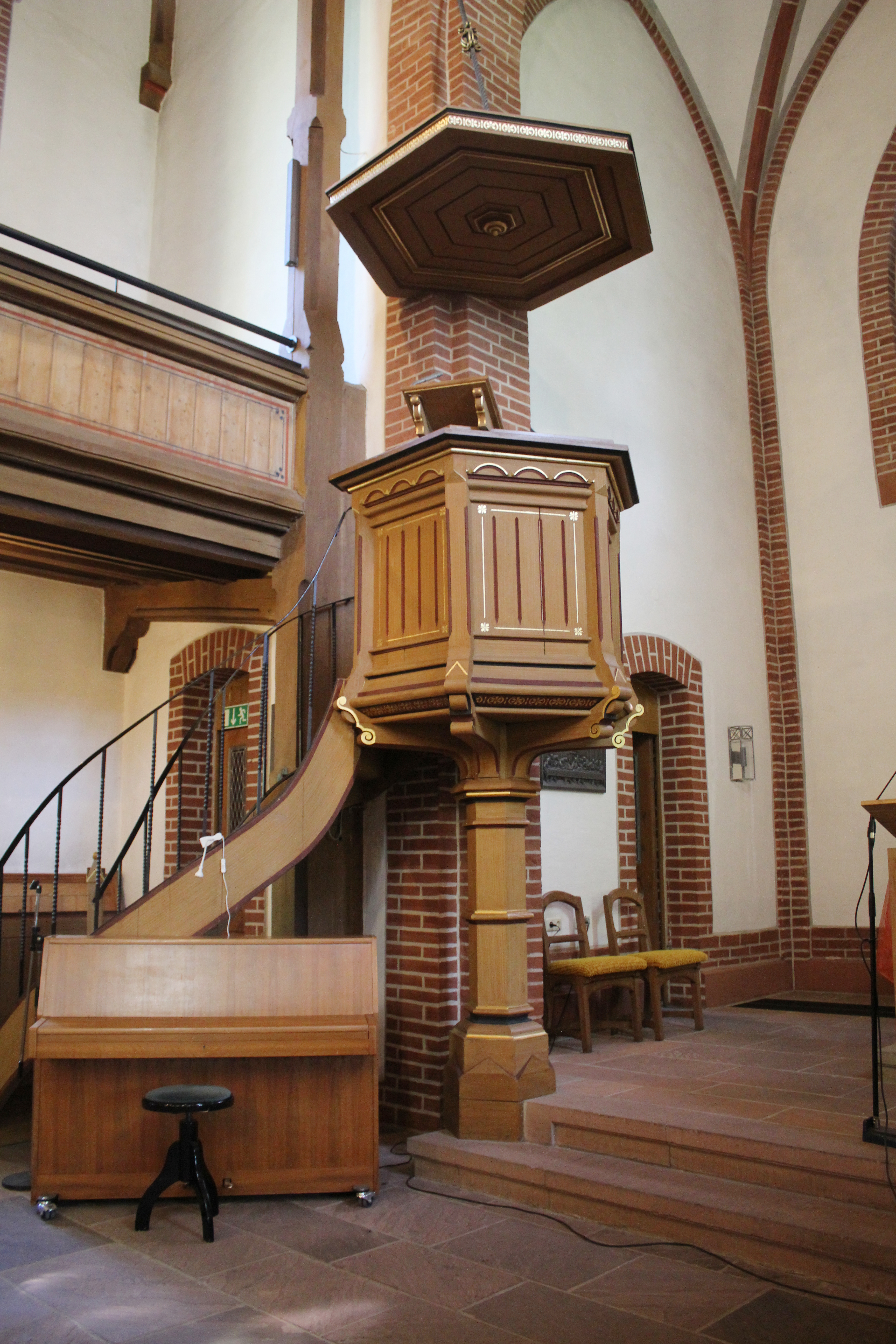 Evangelische Kirche Burgsolms, Solms, Lahn-Dill-Kreis, Hessen, Deutschland